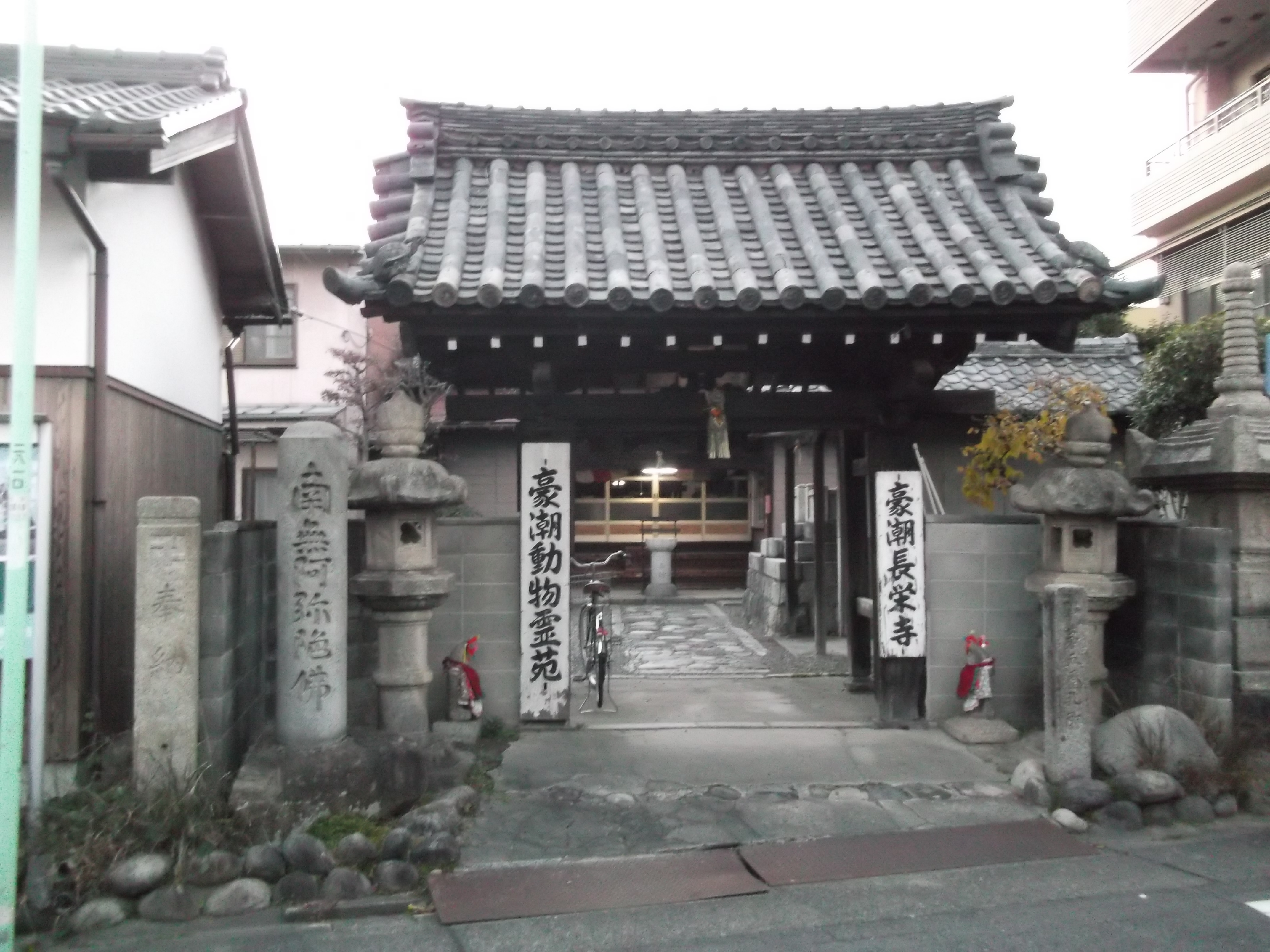 名古屋市北区柳原にある長栄寺を東側から写す。